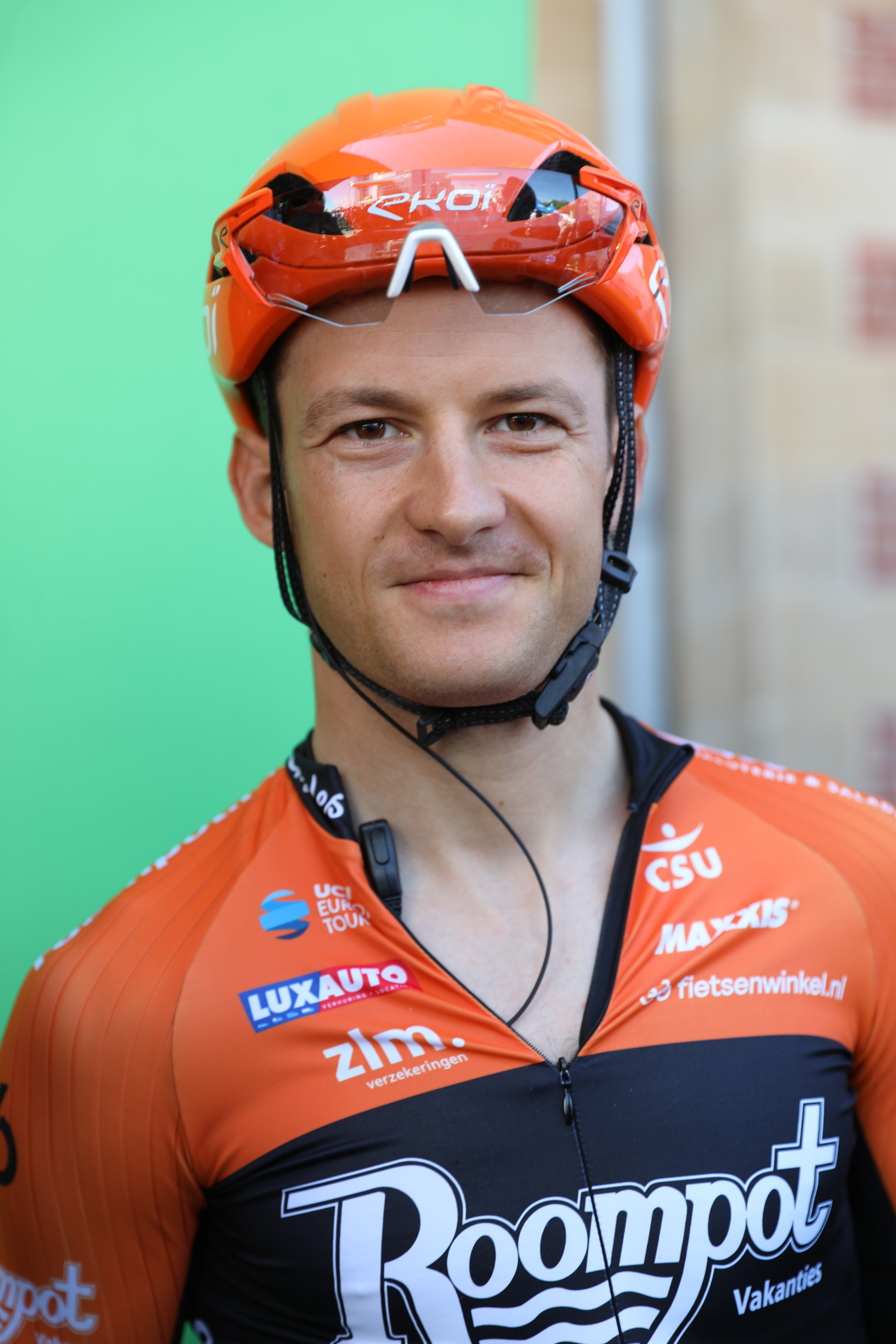 Mathias de Witte, belgischer Radrennfahrer